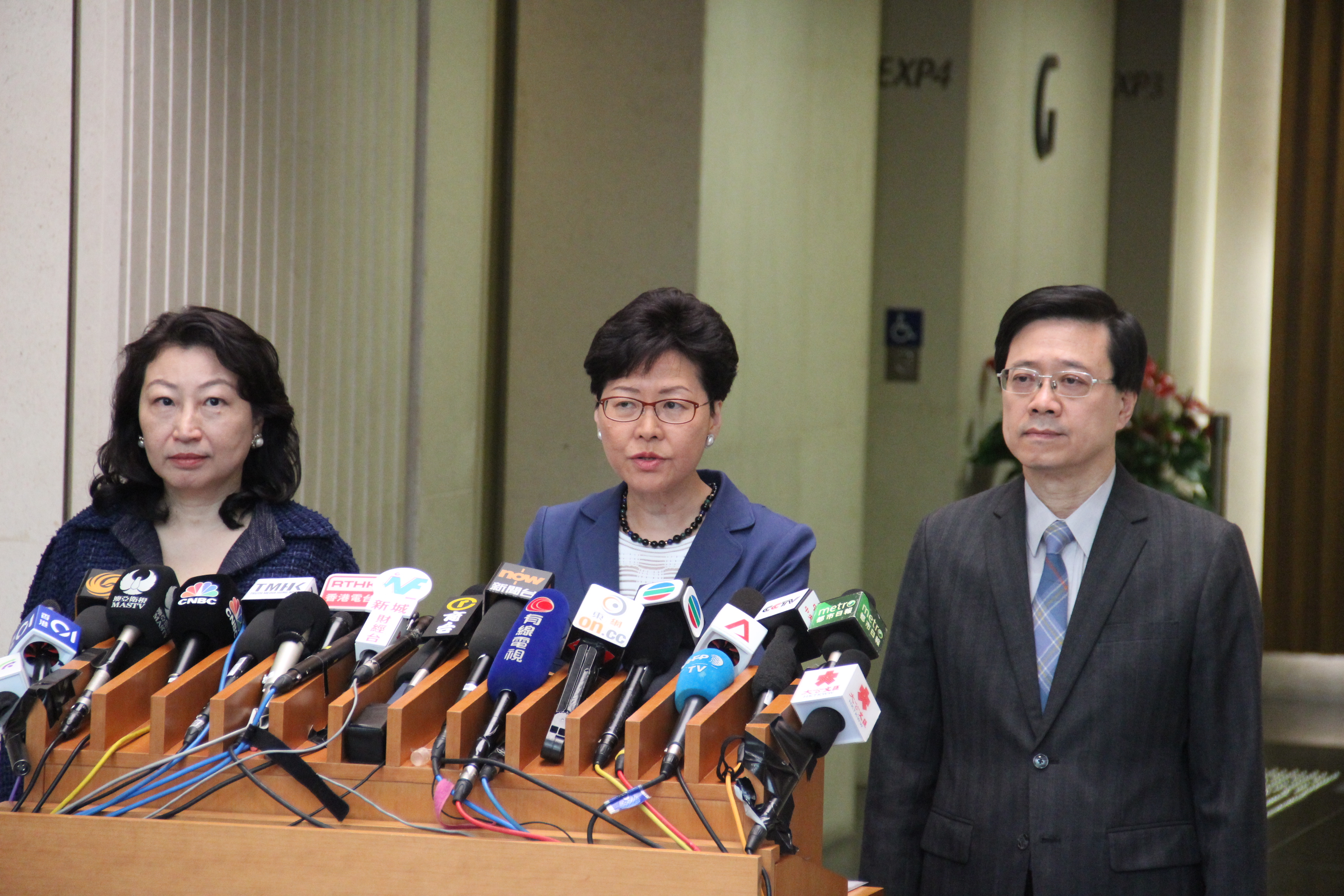 2019年6月10日上午香港特區行政長官林鄭月娥舉行記者會談逃犯條例修法和凌晨警察和示威者對峙事件（美國之音記者申華拍攝）